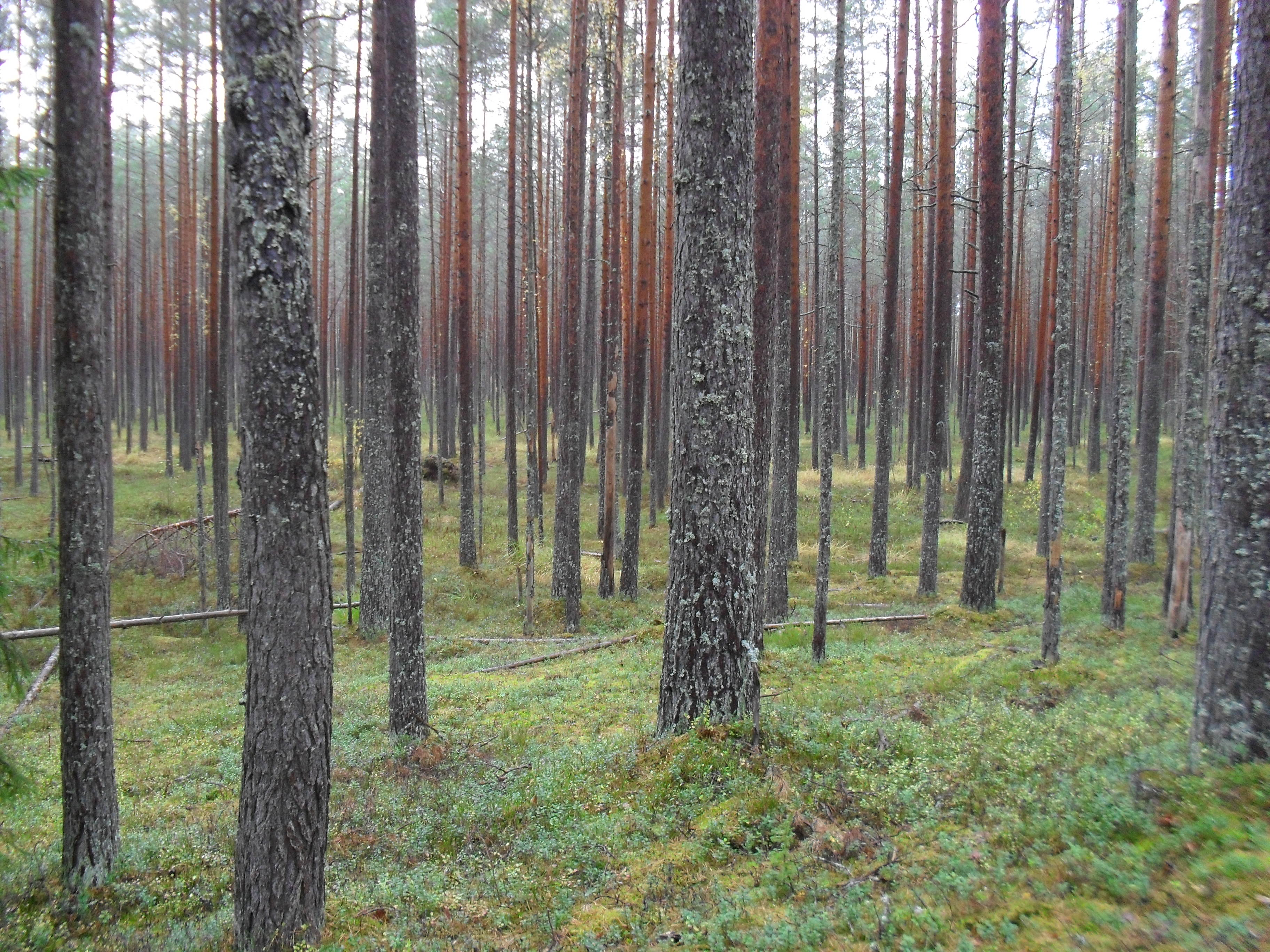 Agusalu looduskaitseala (endine maastikukaitseala) Ida-Virumaal Illuka vallas Agusalu külas.